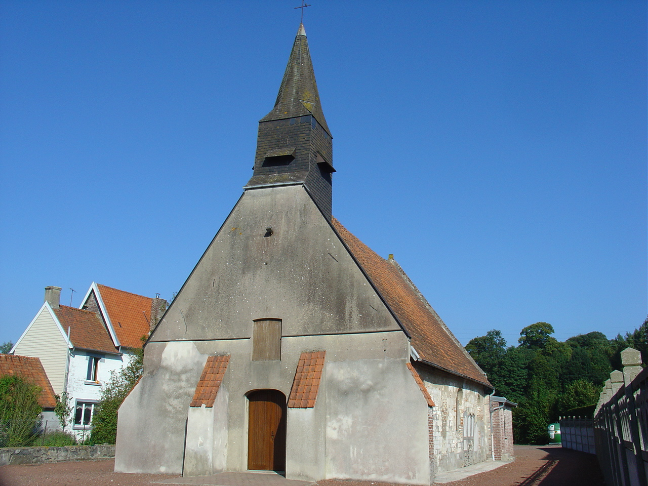 Église de Gauchin-Verloingt